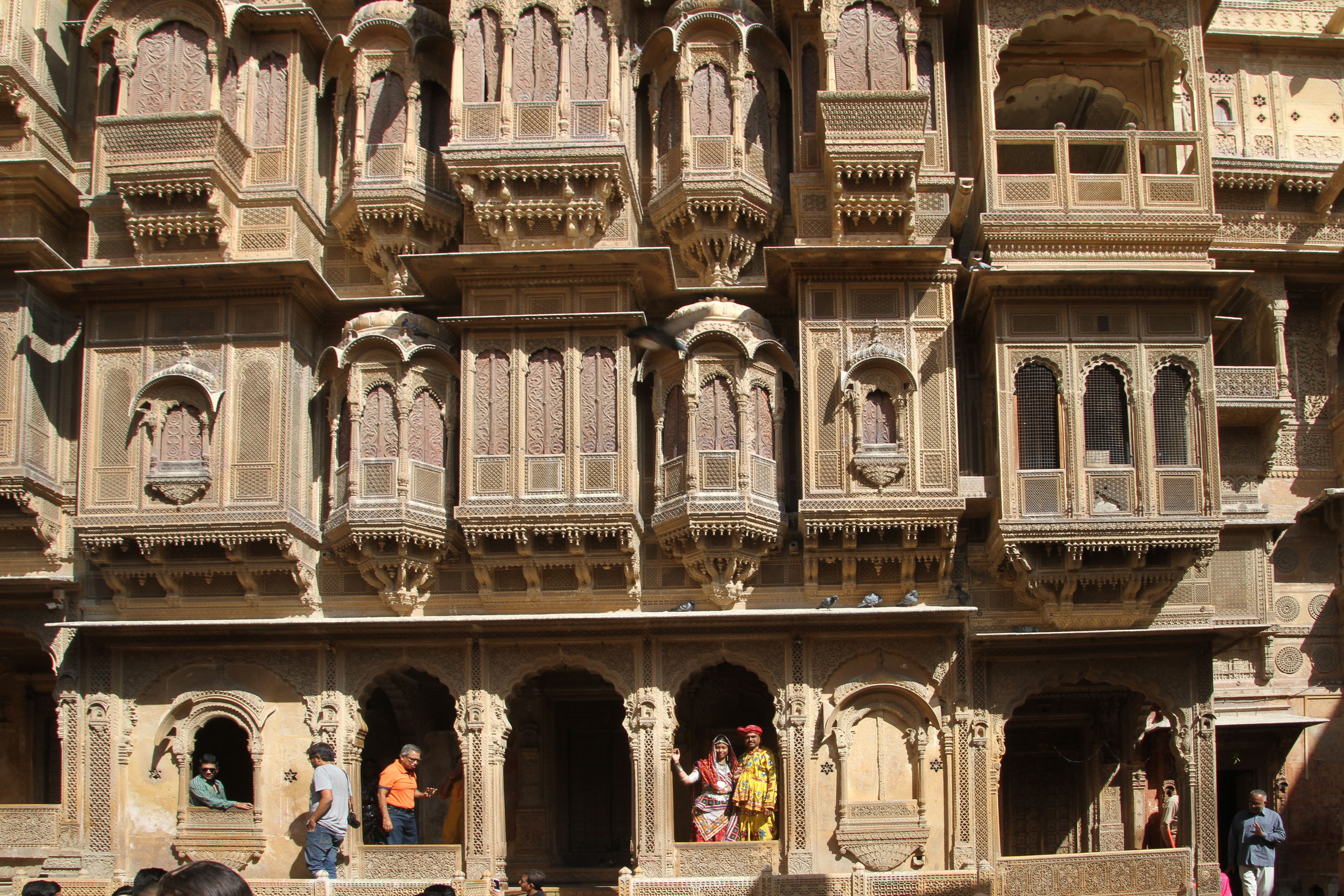 Patwon Ki Haveli (Jaisalmer)